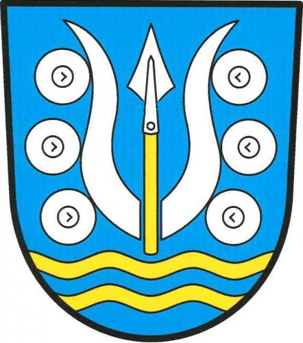 Dlouhá Ves, okres Klatovy, znak